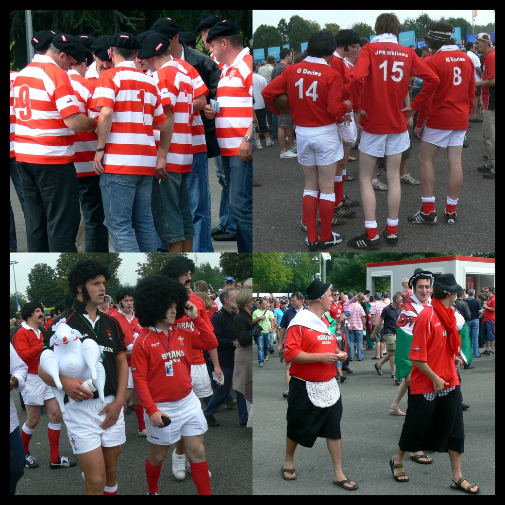 devant les portes du stades c'est un défilé haut en couleur. Un bon esprit festif où le rouge domine. 9 sept - Wales vs Canada